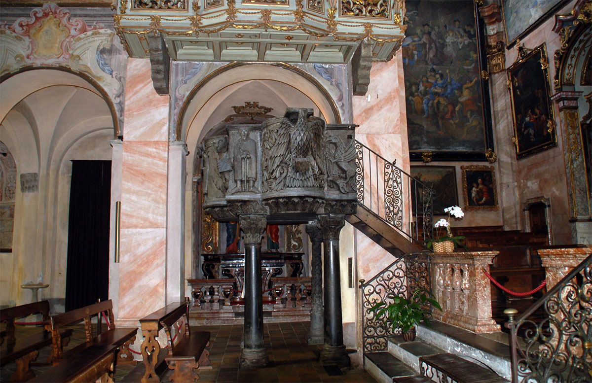 Kanzel in der Basilika auf der Isola di San Giulio, Lago d'Orta, Italy